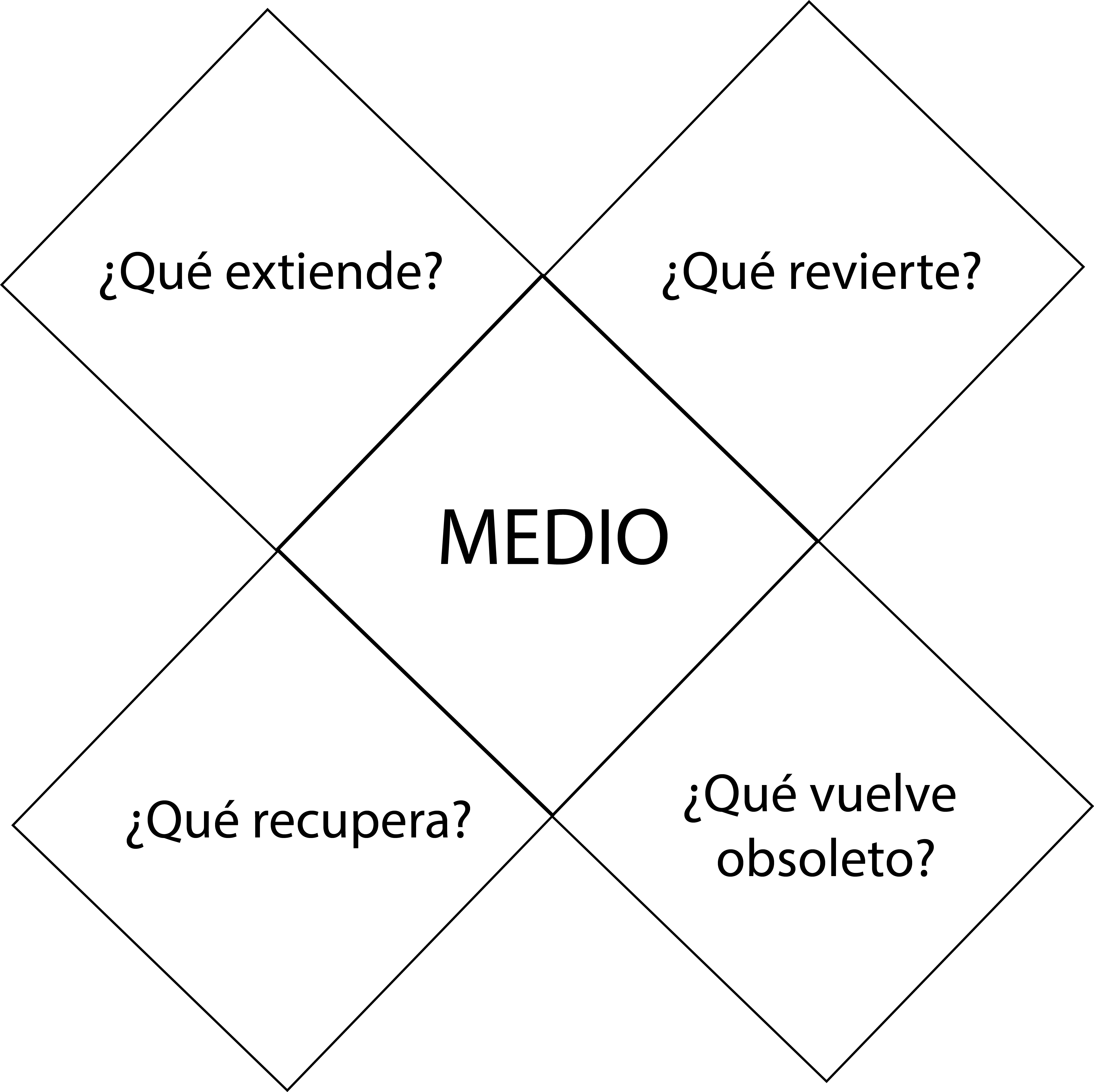 Tétrade de Marshall McLuhan (español)